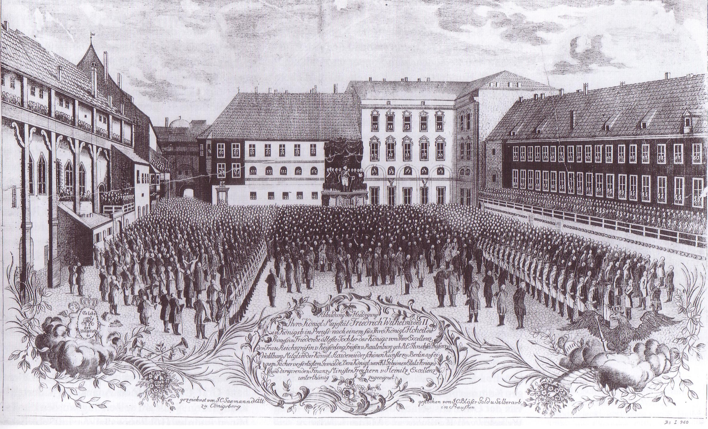 Huldigung für König Friedrich Wilhelm II. von Preußen im Hof des Königsberger Schlosses. Kupferstich nach einer Zeichnung von J. C. Saemann dem Älteren (Geheimes Staatsarchiv Stiftung Preußischer Kulturbesitz)